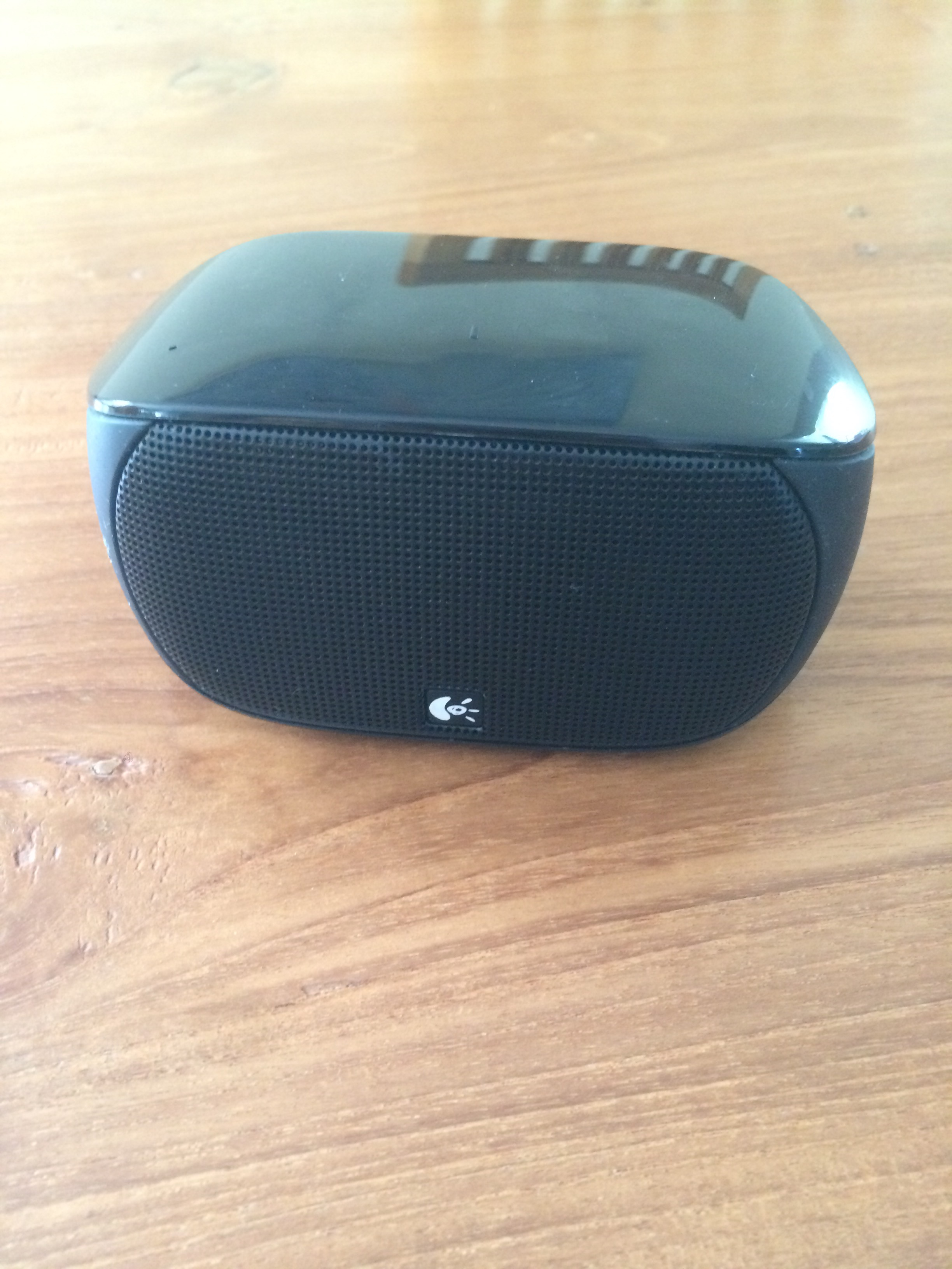 Bluetooth-Lautsprecher